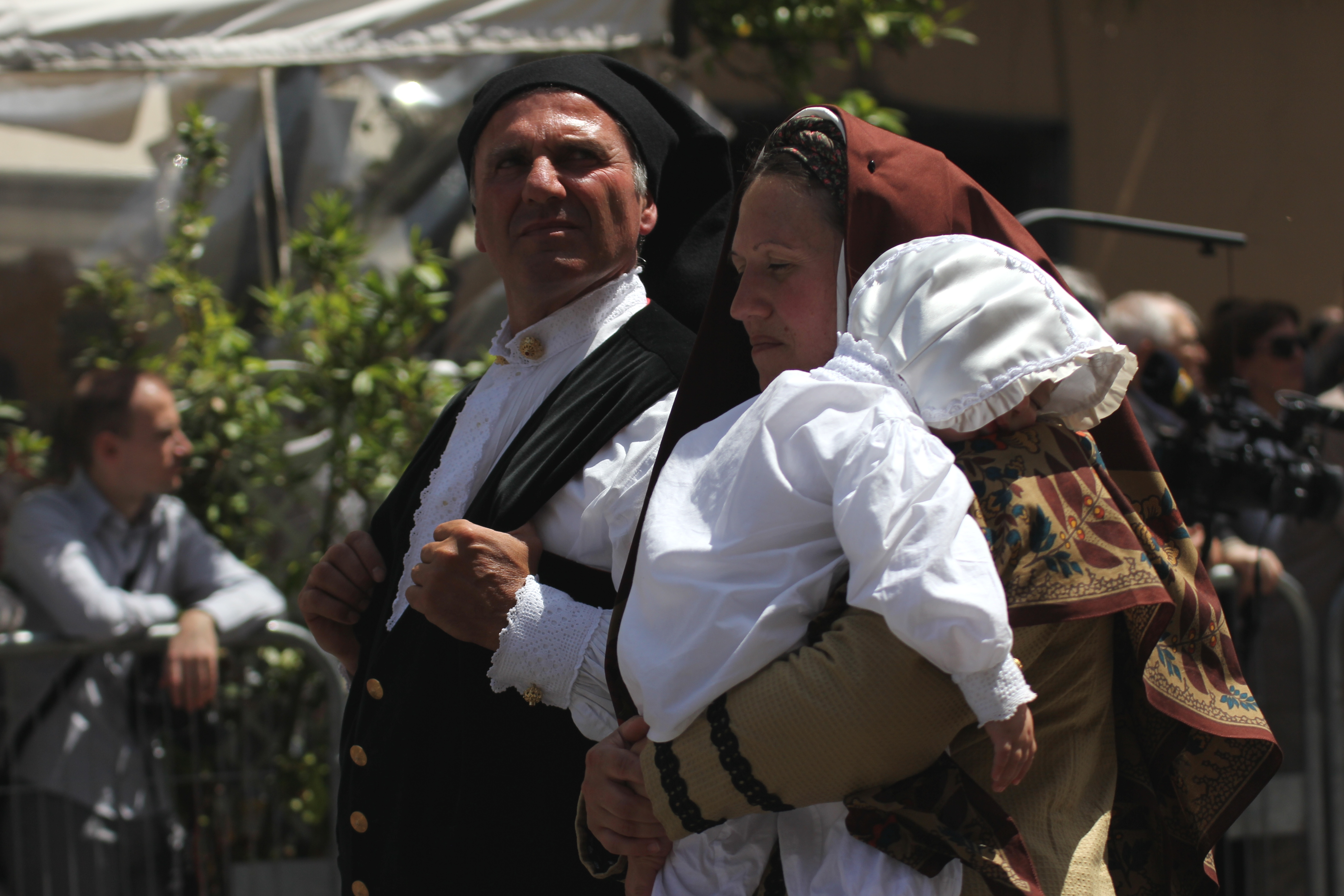 Costume tradizionale